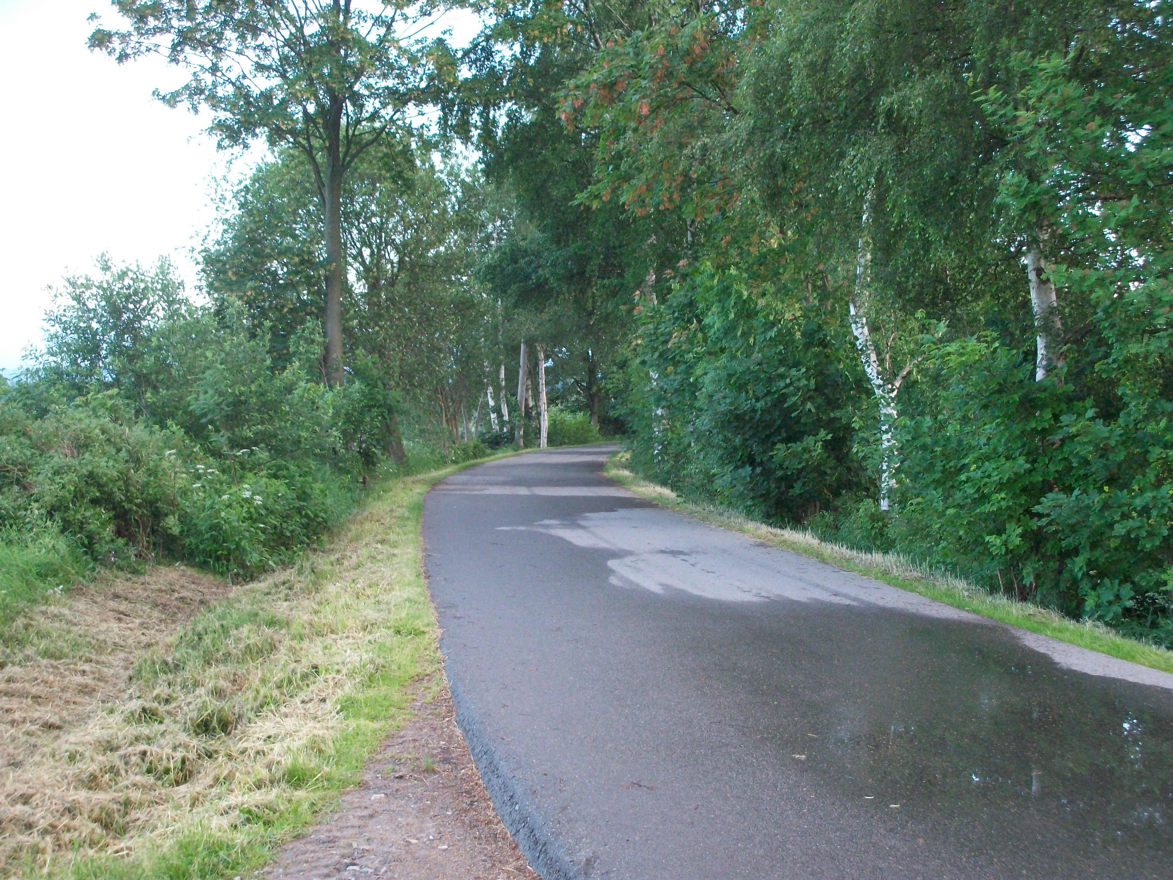 Bahnlinie am Haltepunkt Hermannsdorf (2016)